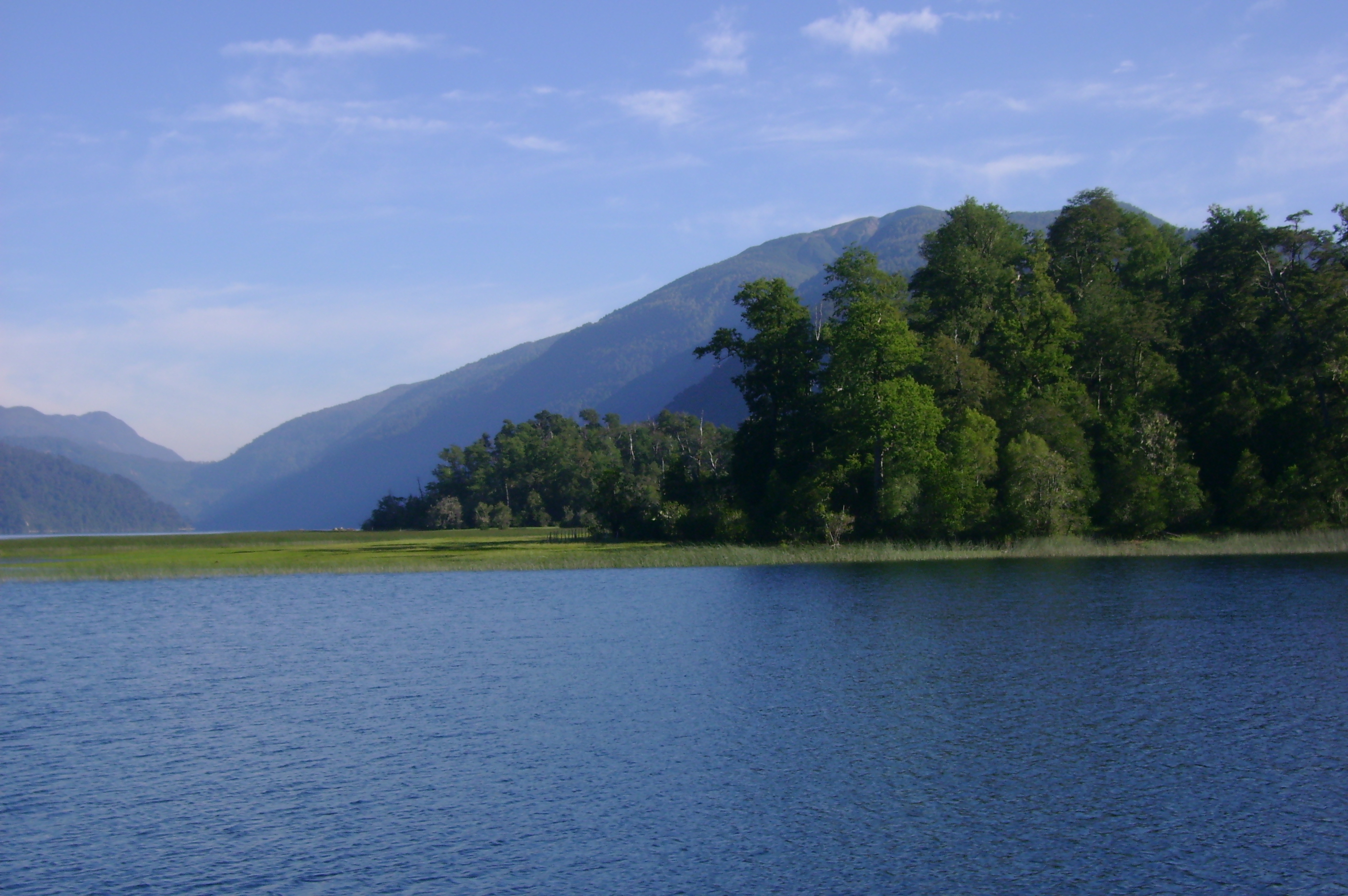 Lago Pirihueico, Chile